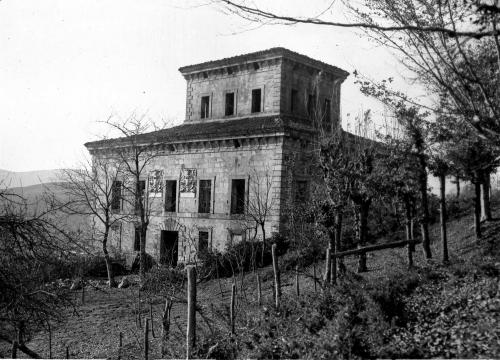 Irimo mendiaren magalean dagoen Ipiñarrieta jauregia. Urretxu. Gipuzkoa, Euskal Herria.